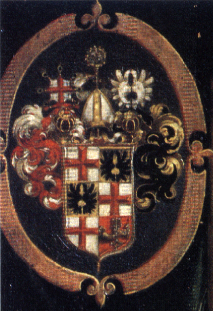 (aus einer Folge der Rosenkranzgeheimnisse).